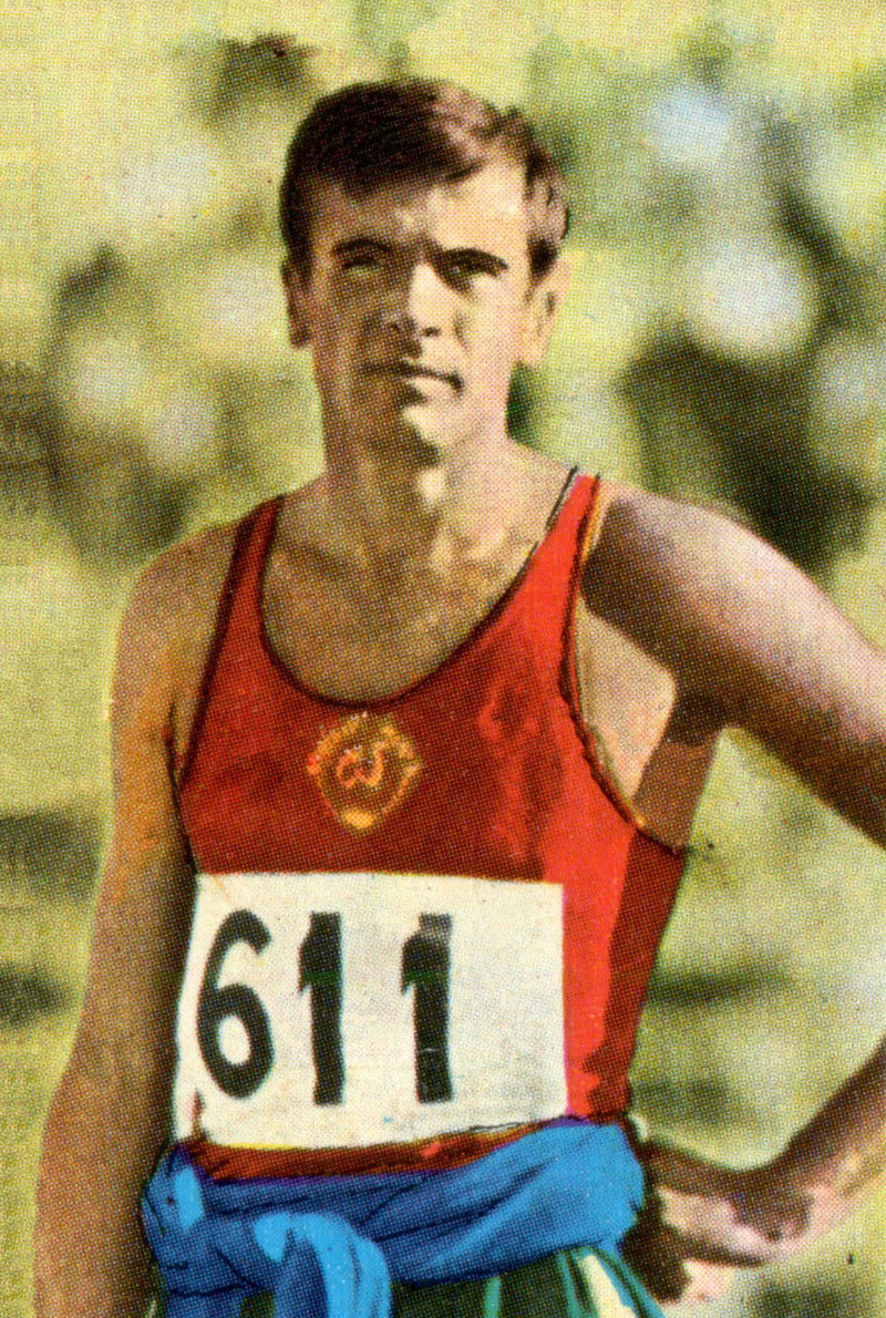 CAMPIONI DELLO SPORT 1970/71-n. 37 - SANEJEV - ATLETICA LEGGERA